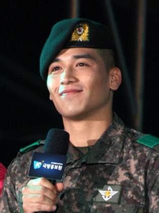 배우 유건